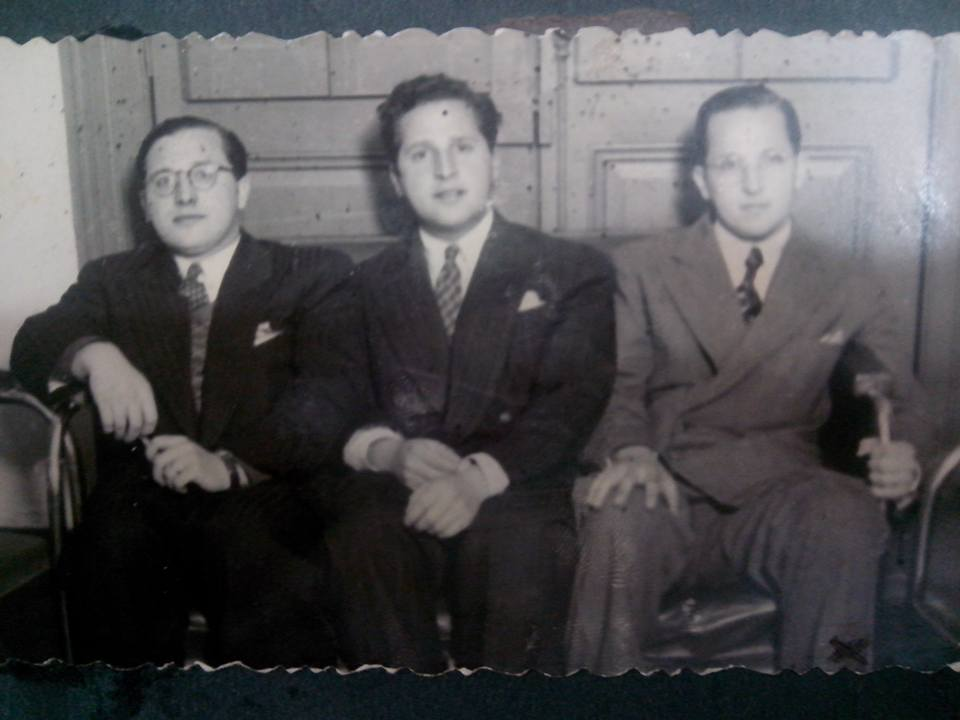 Hermanos Alessio